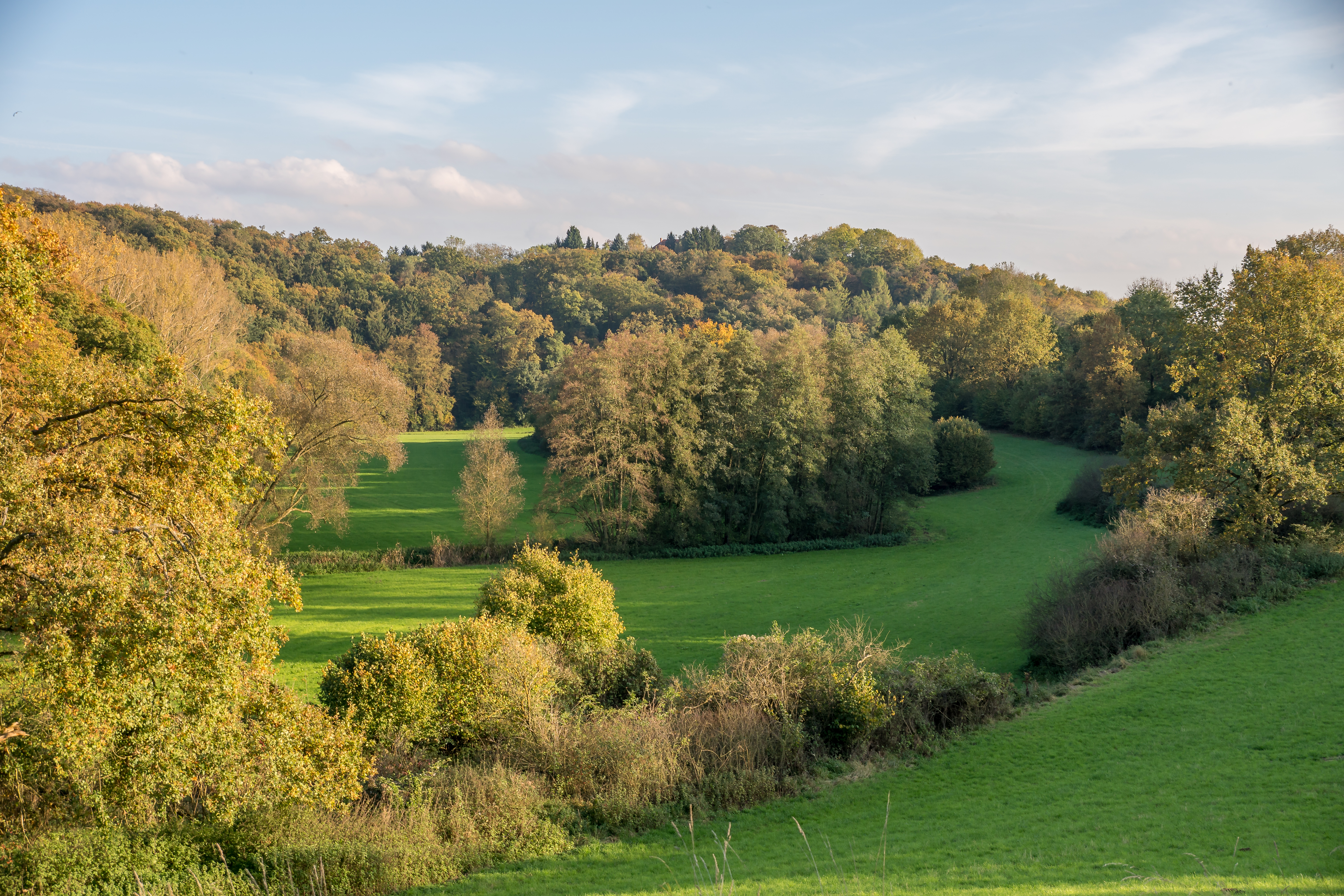 Herbst im NSG Krebsbachtal bei Kaichen